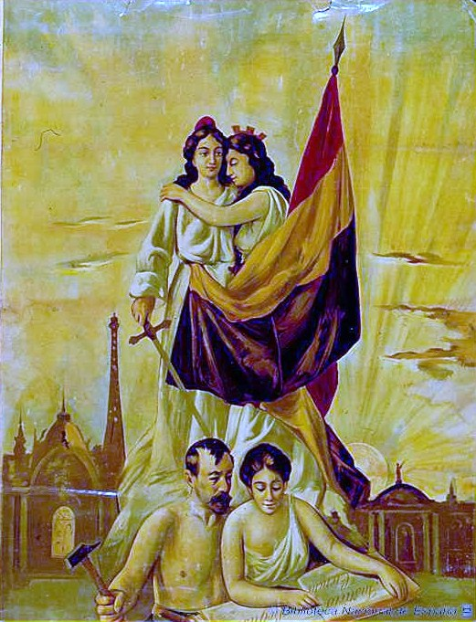 Alegoría de la República española y la República francesa - Catálogo Carteles República y Guerra Civil española.